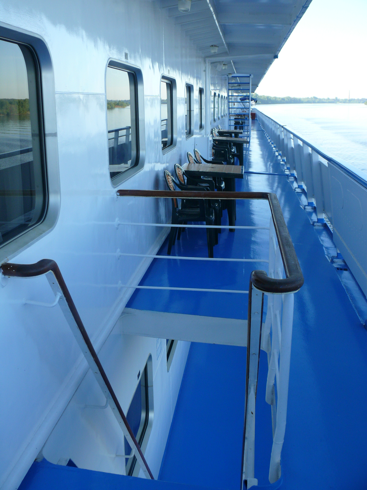 На шлюпочной палубе теплохода проекта 302